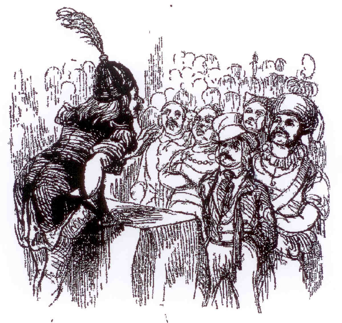 Chicard haranguant la foule carnavaleuse parisienne